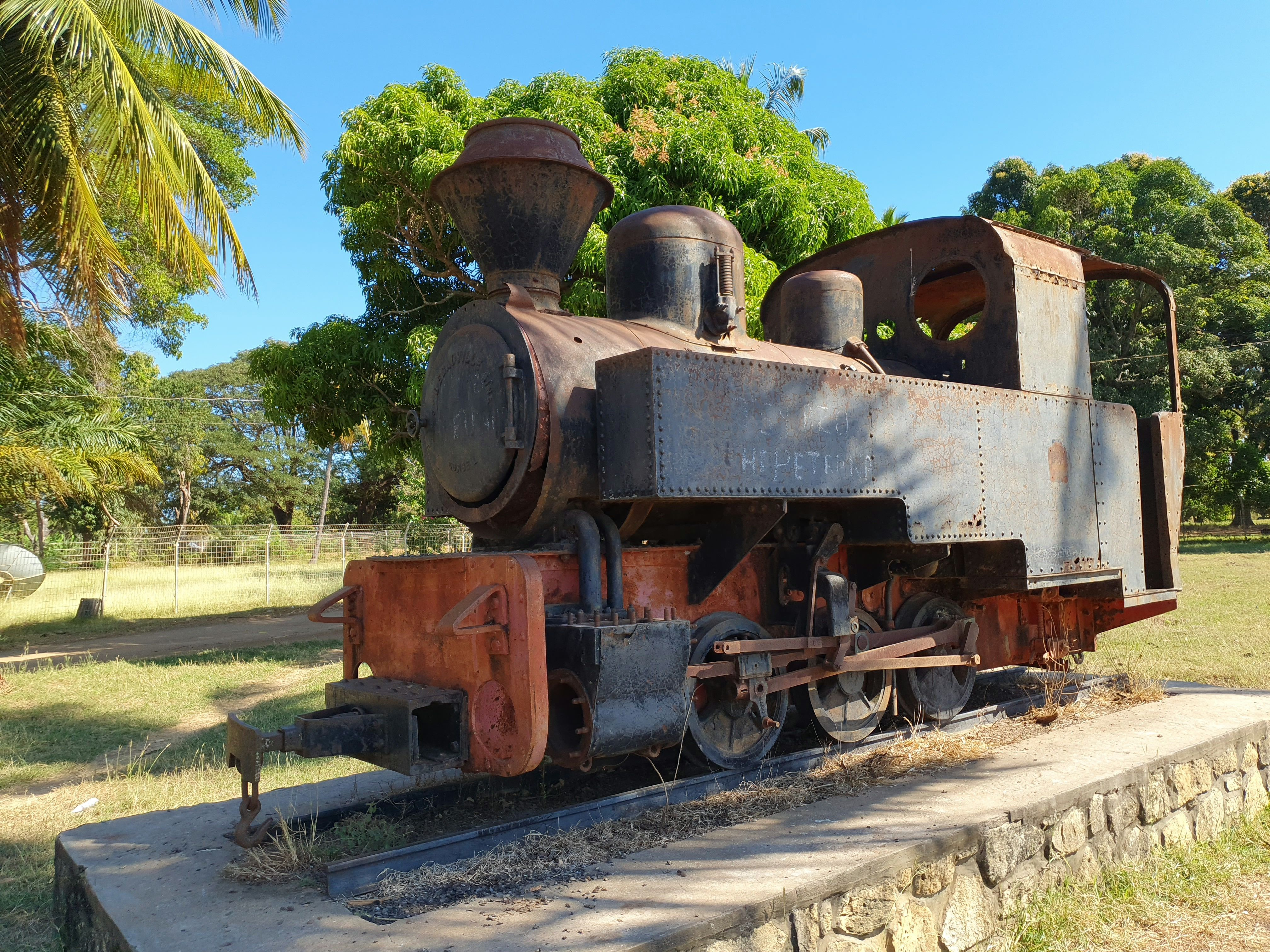 Dampflok für die Zuckerfabrik von Namakia, Madagaskar.